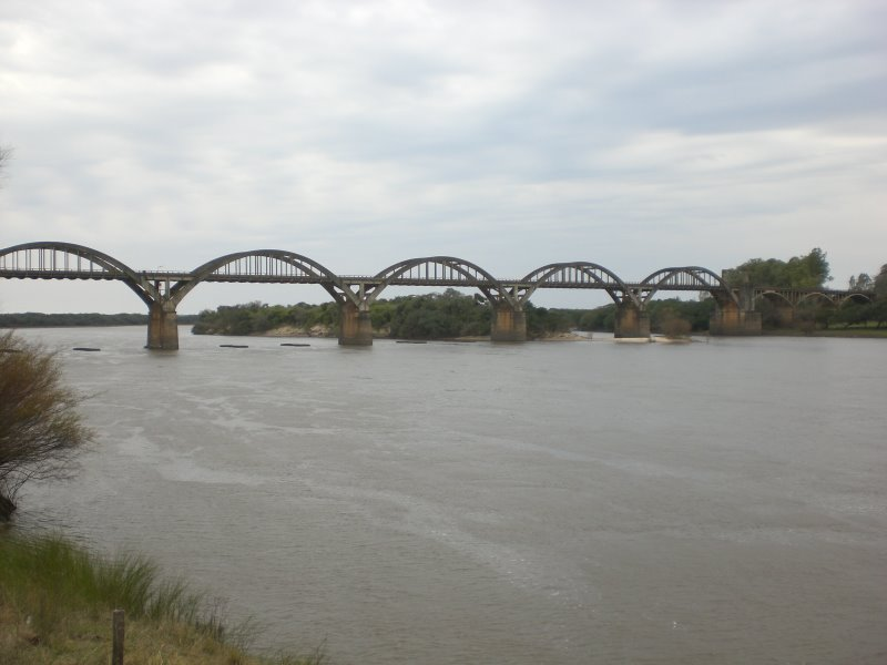 Ponte General Osório sobre o Rio Ibicuí ( Manoel Viana - RS)